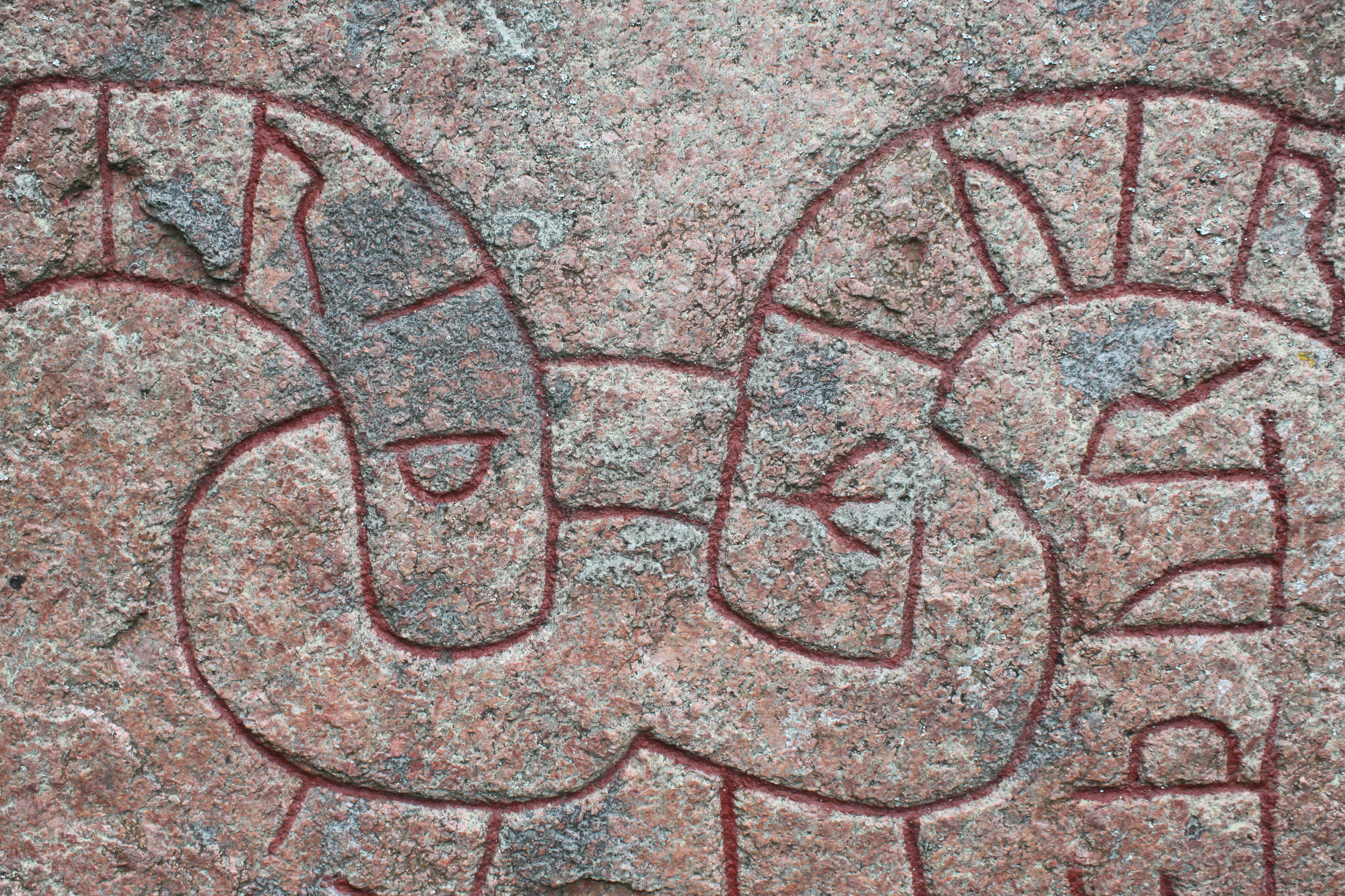 Vallentuna 225:2. Runristning. Fast fornlämning. (U 225).